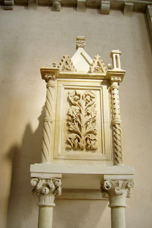 Tabernacolo della chiesa abbaziale di Santa Maria Arabona,Manoppello (PE)-Italy. Foto scattata da Alan_p.